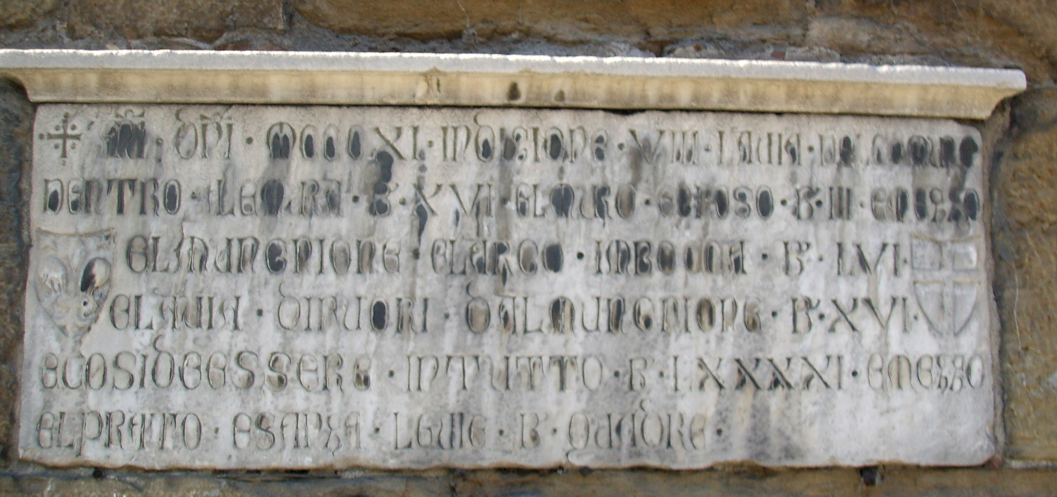 Lapide del 1311 su Porta_al_Prato a Firenze.